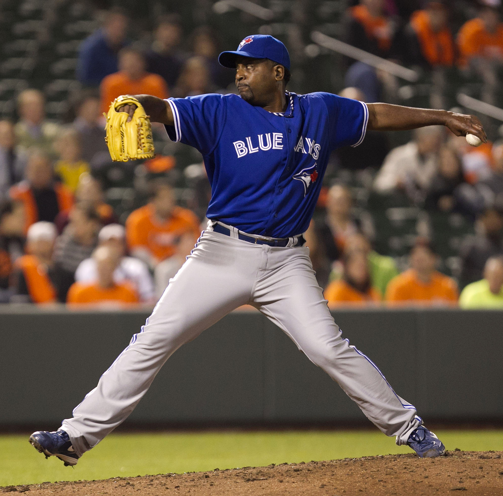 Darren Oliver